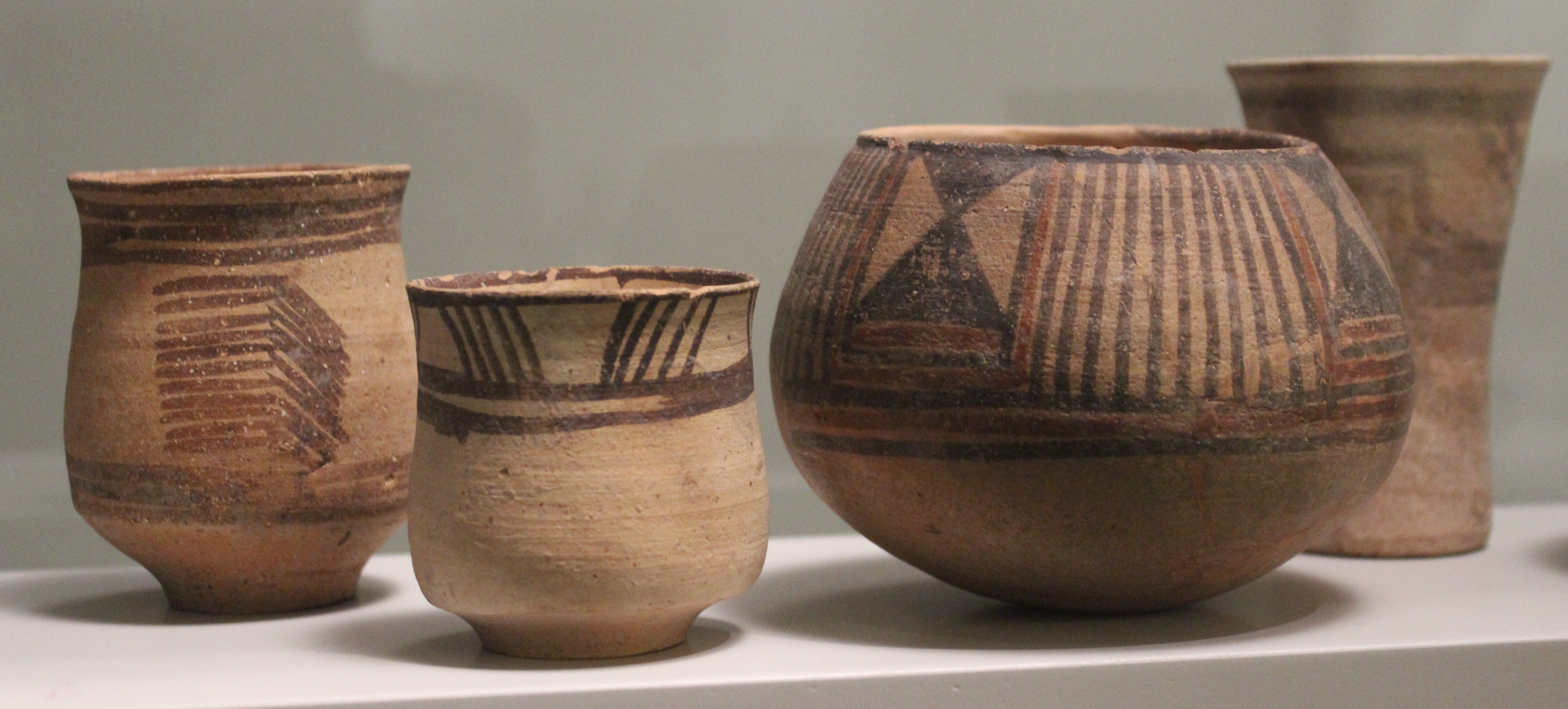 Musée Guimet. Cerámica prehistórica Afghanistan, Jean Marie Casal: Fouilles de Mundigak. Paris 1961, fig. 74, no. 237a (Periode IV, the left vessel), pl. XXXIIB (Period IV, second vessel from left); pl. XXXB (Periode III, third from left), fig. 77, no. 267 (Periode IV (vessel on the right).